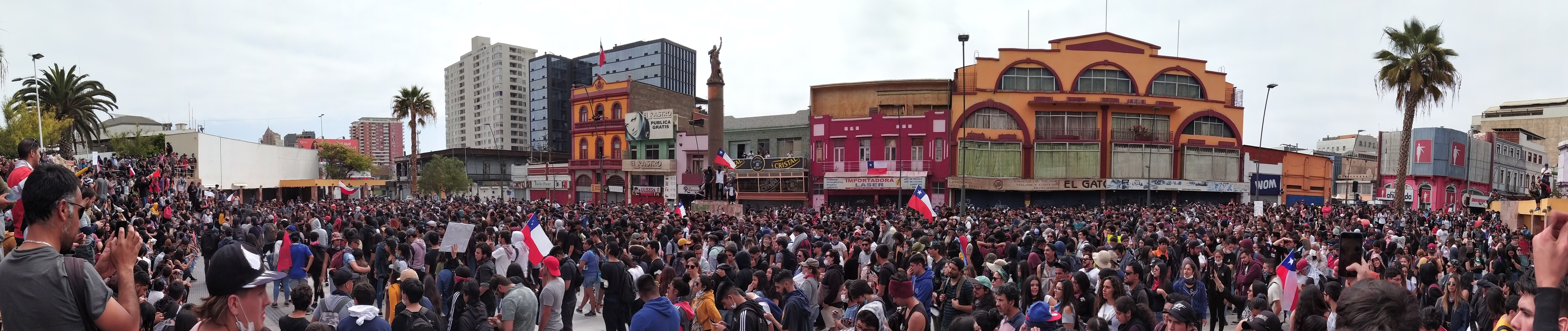 porcentaje de personajes, 21 octubre 2019